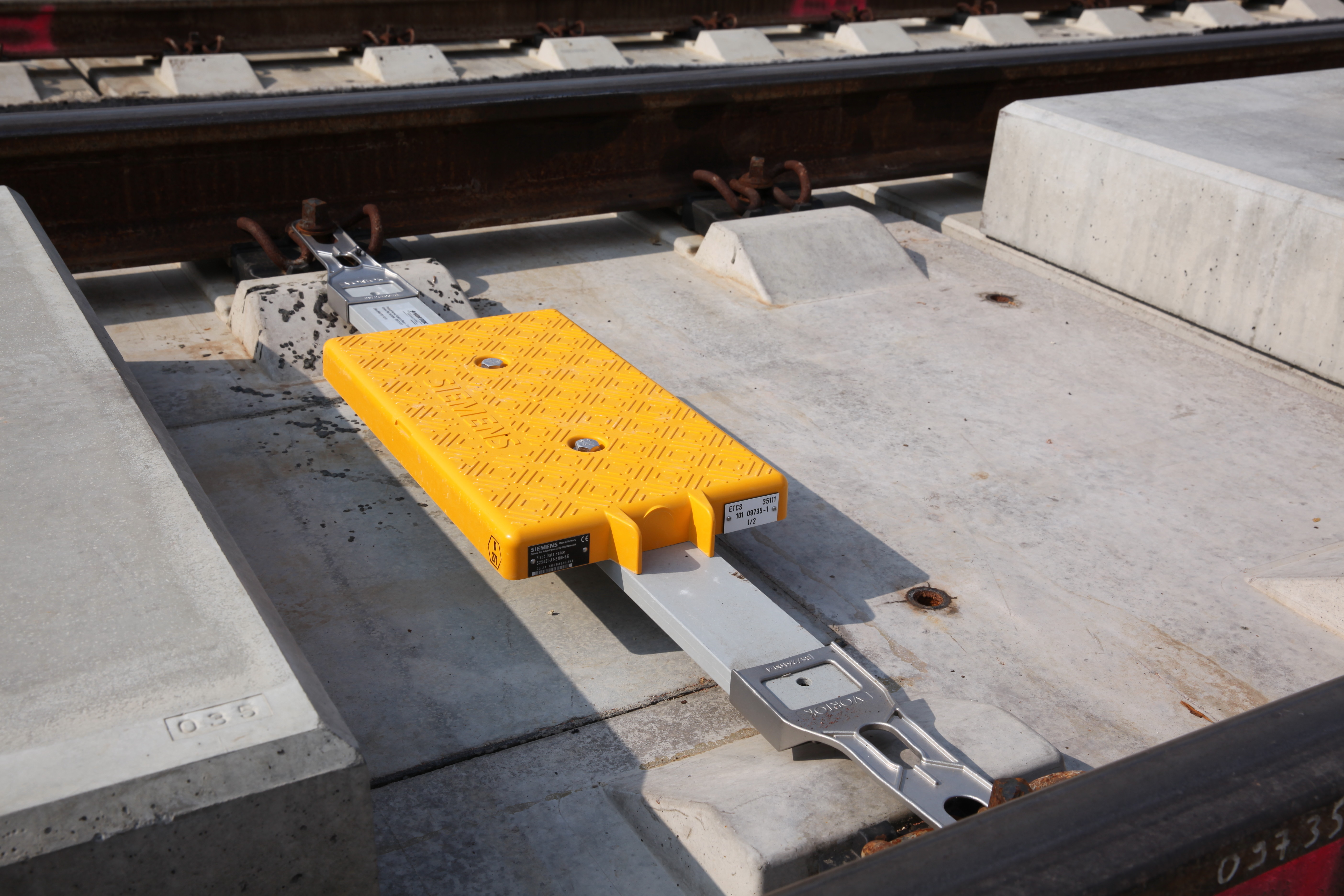 Eurobalise auf der NBS Ebensfeld-Erfurt im Bereich eines mit Kfz befahrbaren Abschnittes vor dem Tunnel Kulch noch ohne Abdeckung